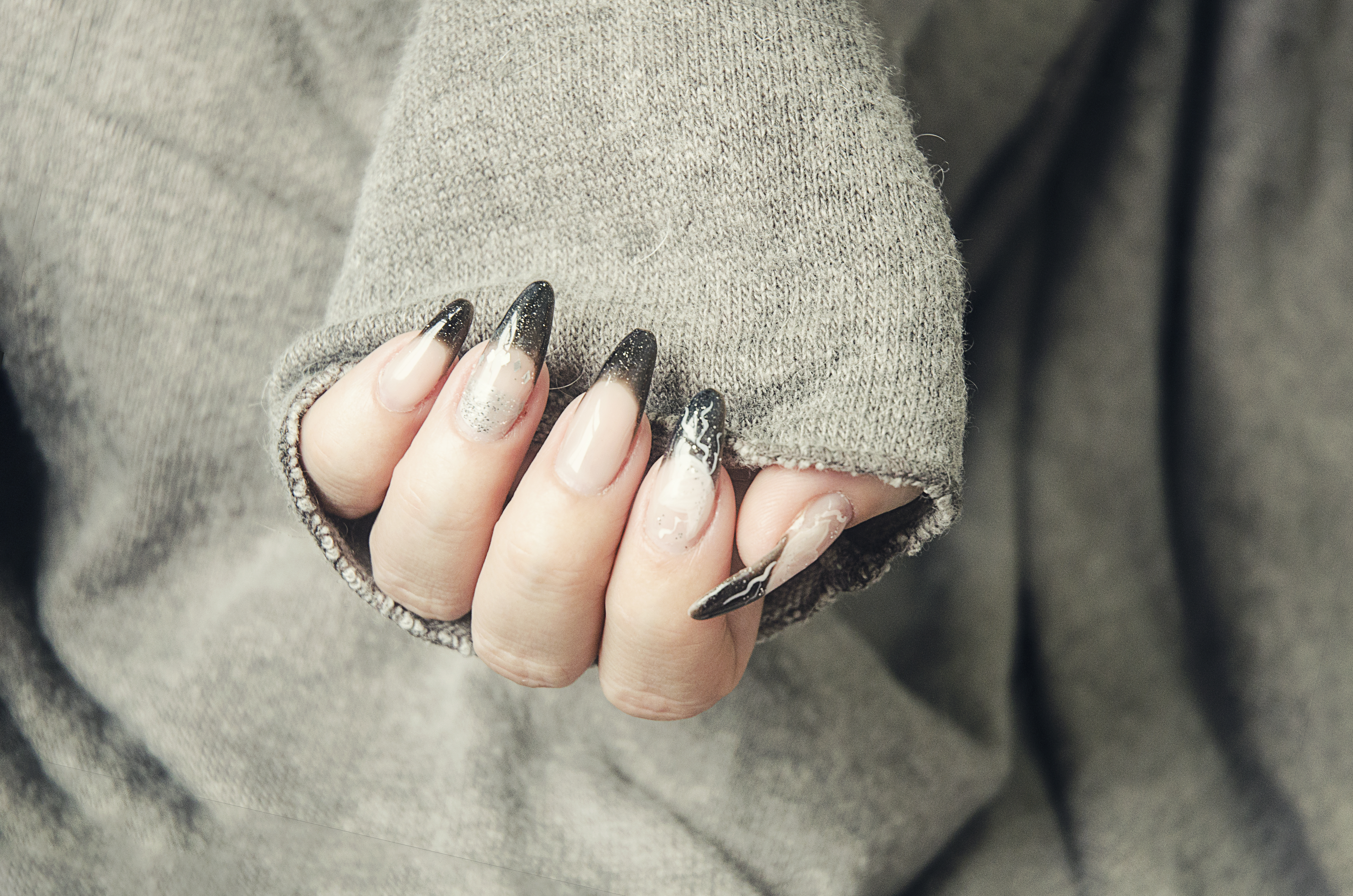 Extensões de Gel estilo Unha Francesa com decoração Nail Art.